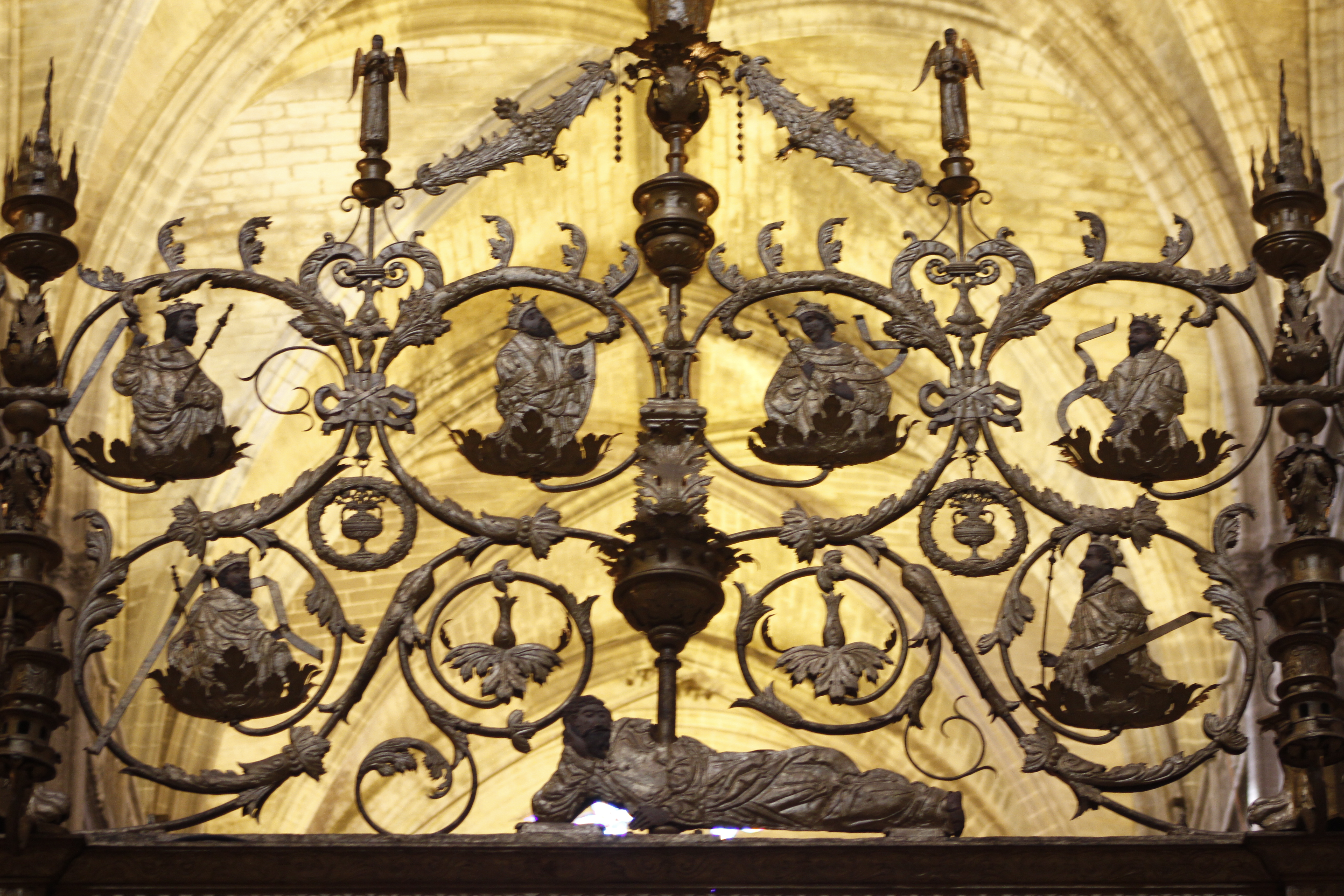 Árvore de Jesse.